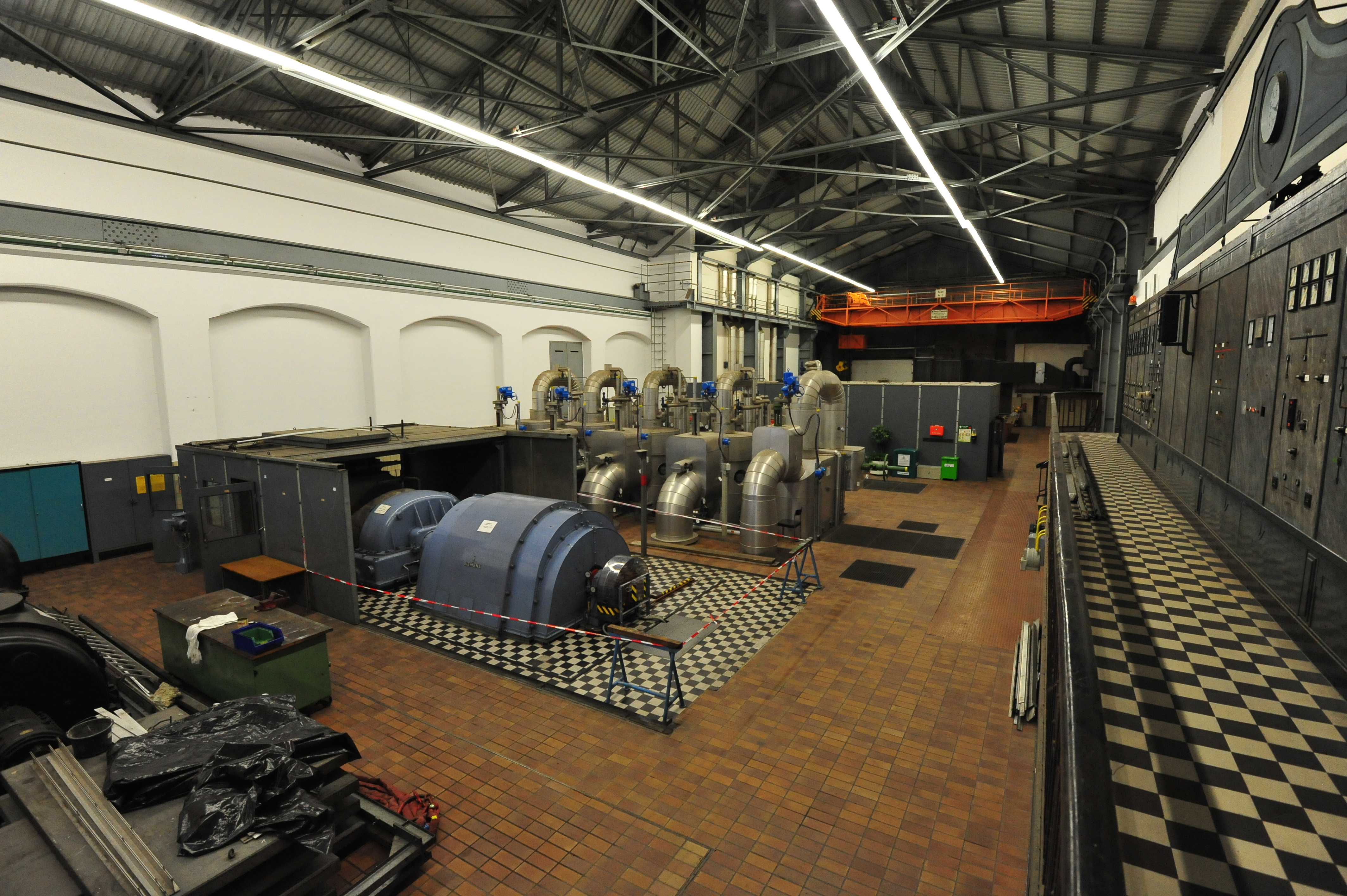 Heizkraftwerk Alt-Oberhausen (HKW1) - Maschinenhalle, Blick von alter Schaltwarte in Richtung T3